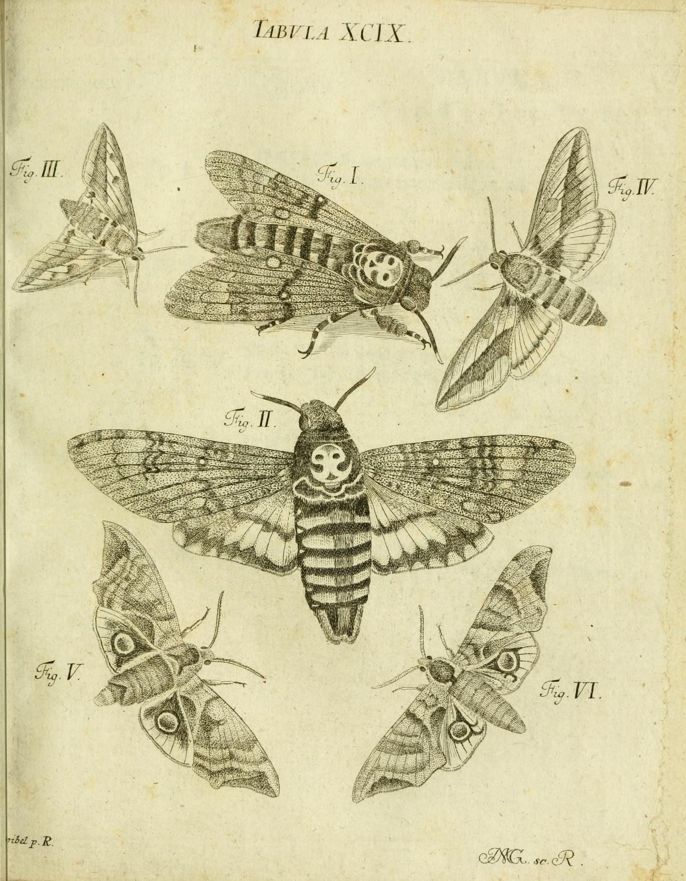 a XCiX fp:.ii. ; ( .^.TF" ^x ^^. VI . '^dp.Tt. A.. sc. C '^.